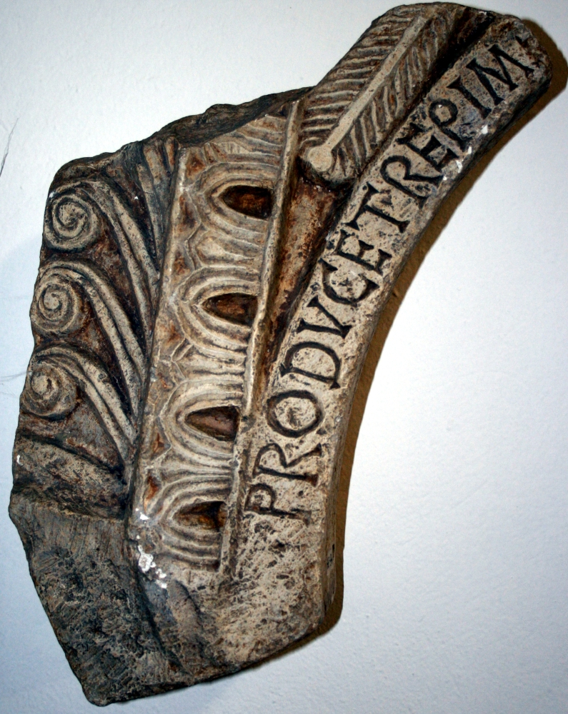 Fragment grede s natpisom kneza Trpimira, 9. stoljeće, Rižinica kraj Solina, sadreni odljev Gliptoteke, HZ-94